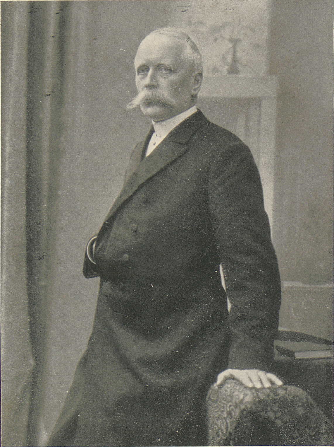 Hermann Eickhoff (* 3. Mai 1853 in Gütersloh; † 1934), Lehrer in Gütersloh, Schleswig und Hamm